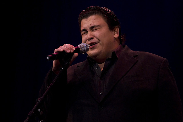 Ricardo Ribeiro, fadista